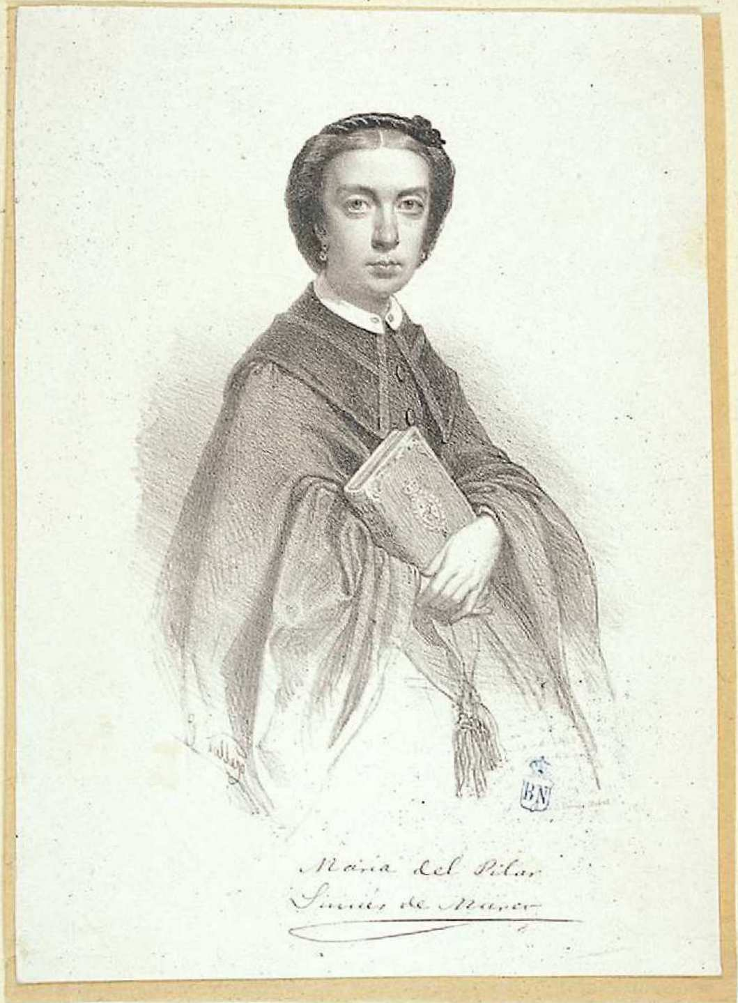 María del Pilar Sinués de Marco. litografía de José Vallejo y Galeazo. Ilustración de su obra La ley de Dios. Colección de leyendas. Madrid, 1858